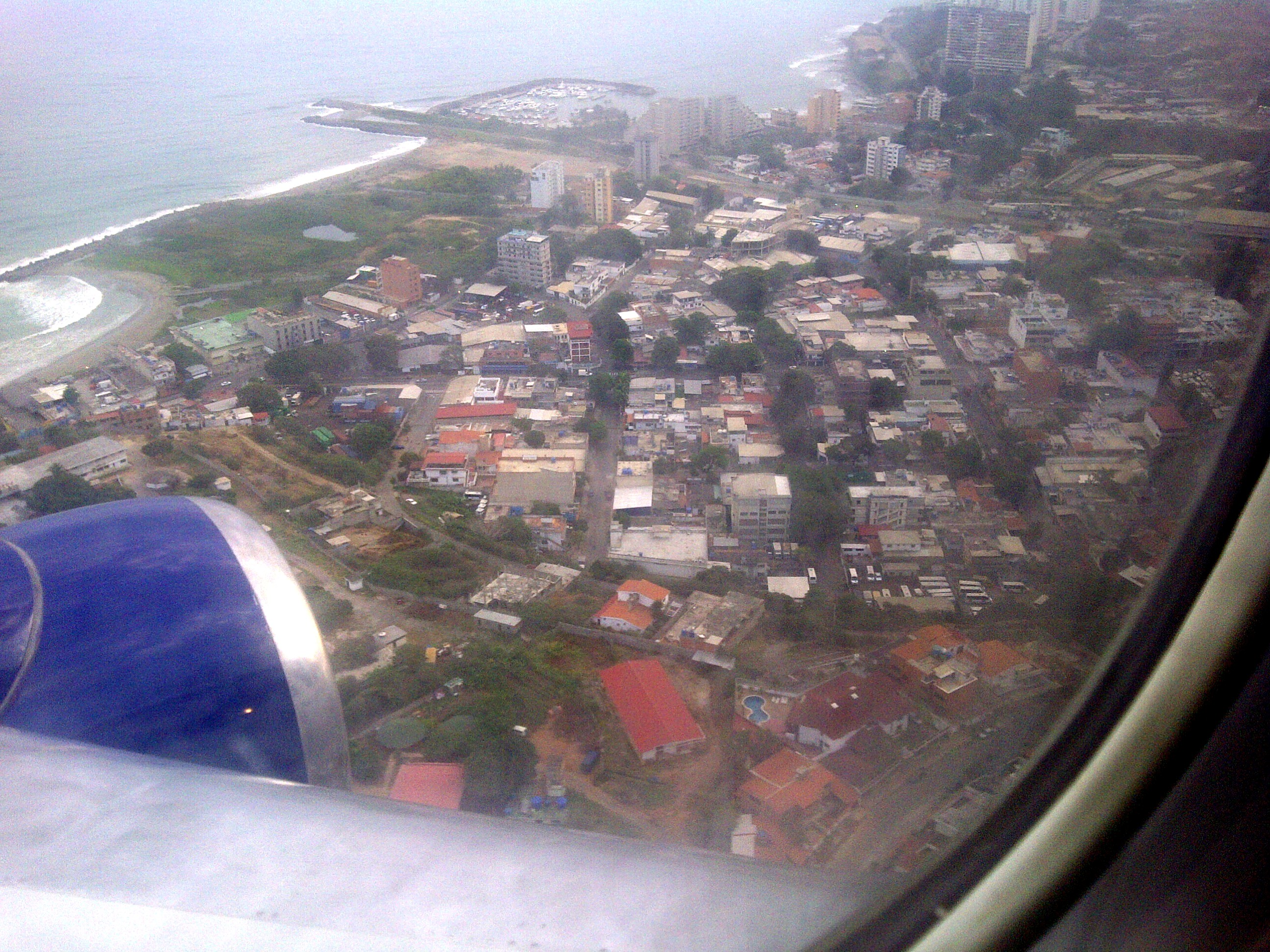 Cielo y vista aereas de Catia La Mar, estado Vargas - Venezuela (2012)